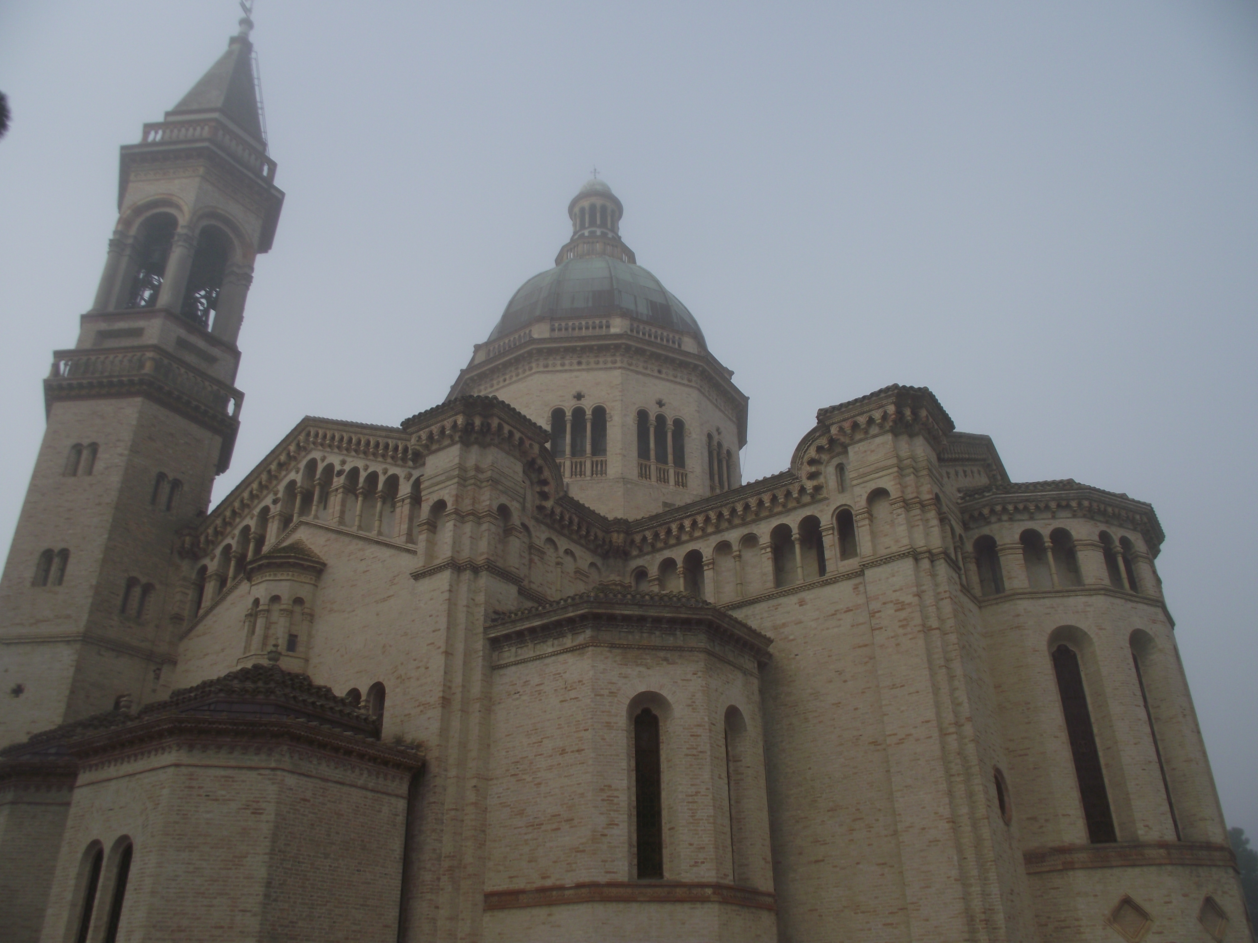 Osimo, Santuario di Campocavallo, XIX secolo